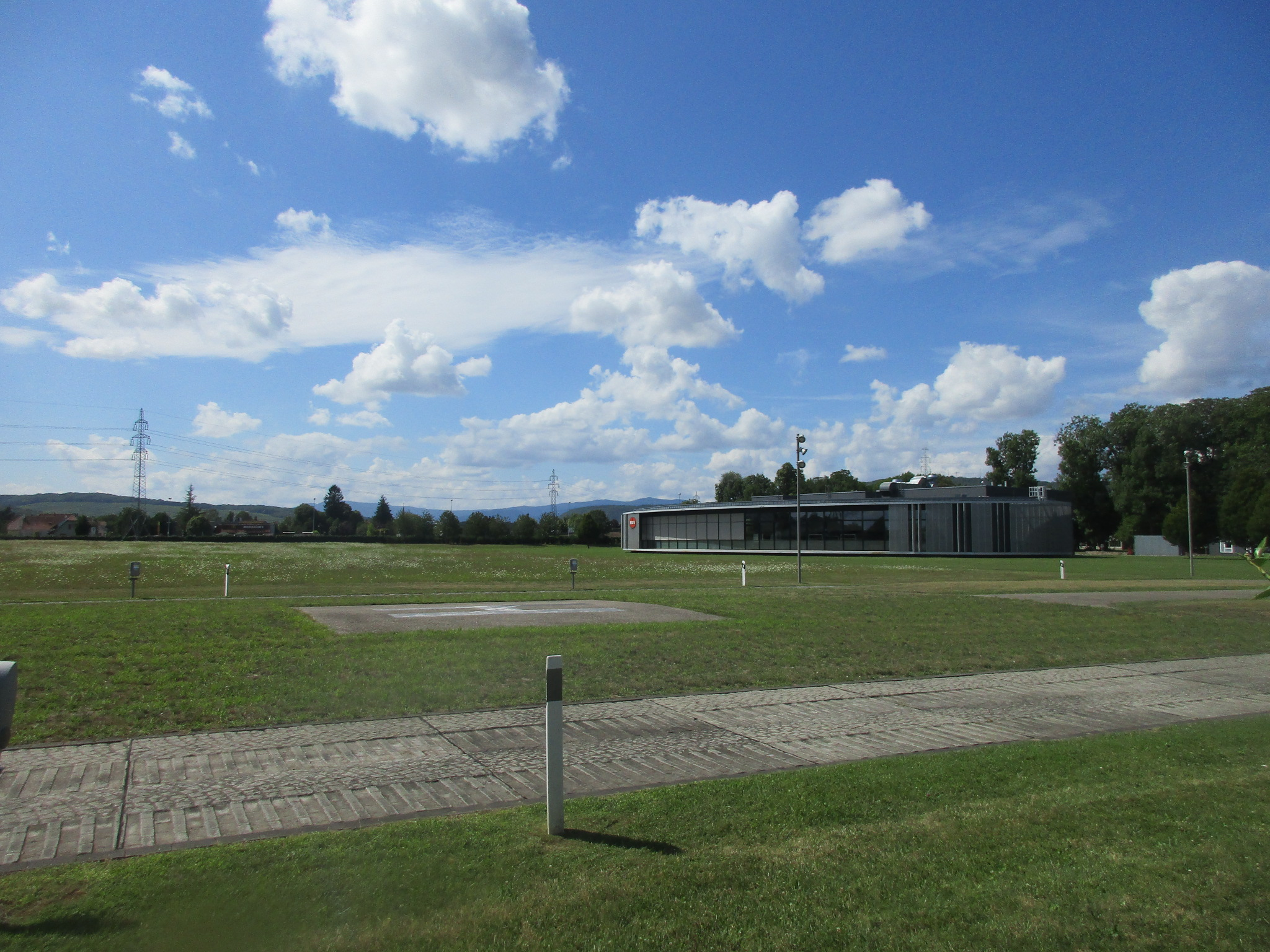 " L'Atelier " Bugatti